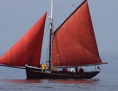 bateau de pêche la Grandcopaise, embleme de la ville